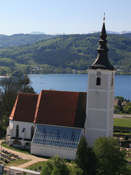 Pfarrkirche Seewalchen Nordansicht